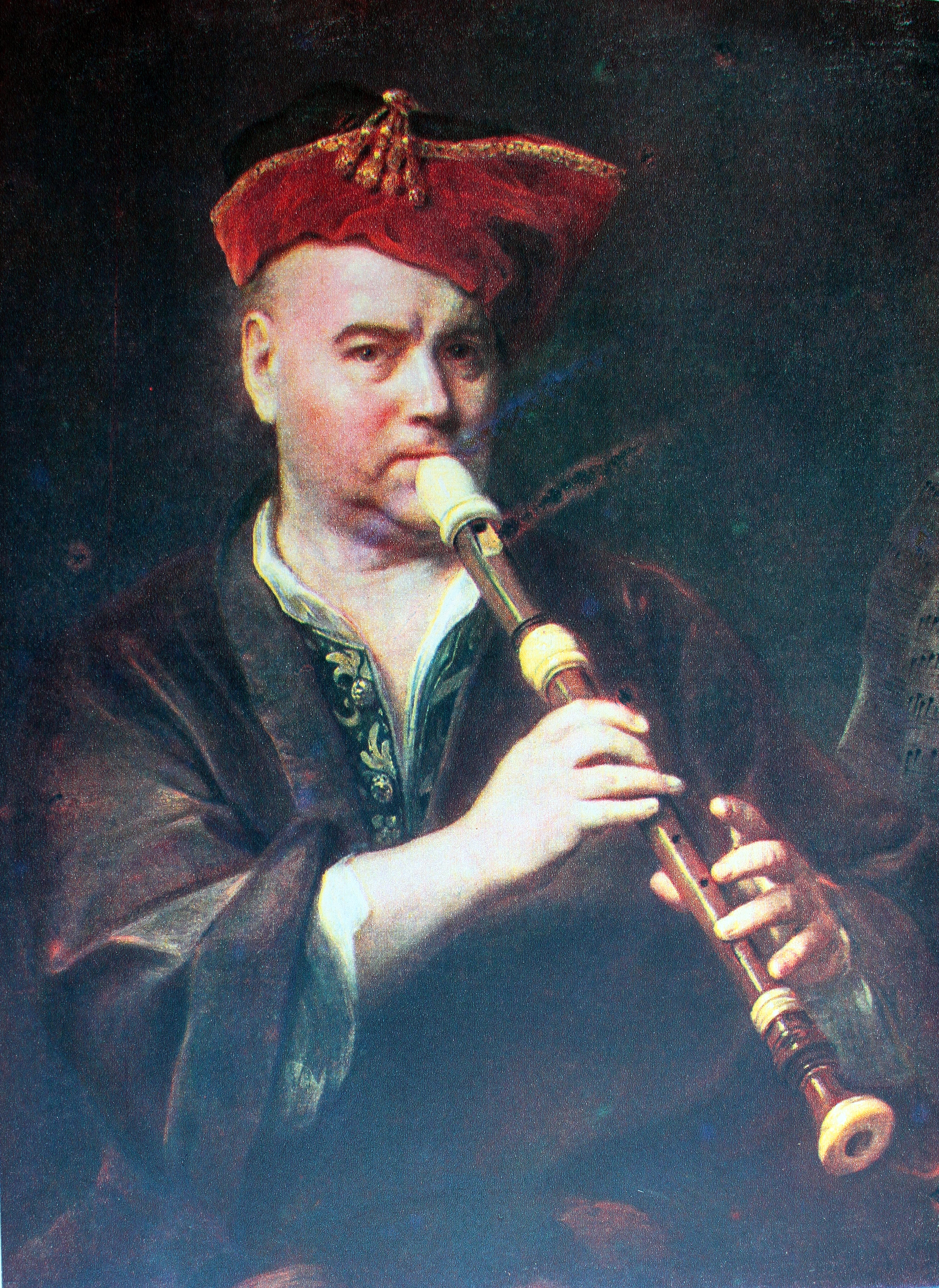 Kupeczky János: Tárogatón játszó férfi. Kupeczky Jánosnak két festménye van a Szépművészeti Múzeumban, egy nyílt tekintetű, meleg tónusokban festett ülő férfi portréja, továbbá egy még biztosabb kézzel, erőteljesebben festett, tárogatón játszó férfi. Mindkét kép a Szépművészeti Múzeum újabb szerzeményei közé tartozik.